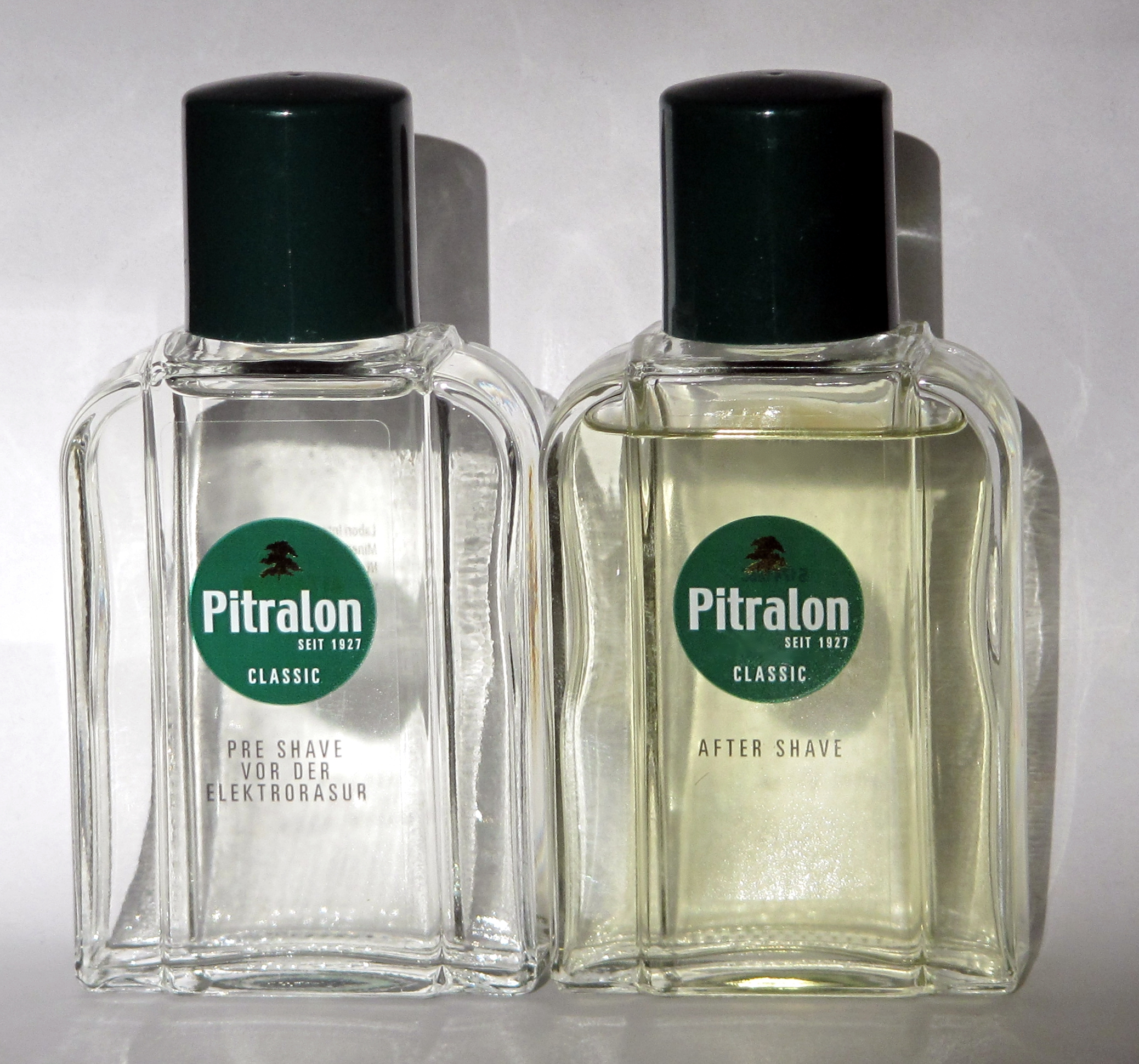 Pitralon (jeweils eine volle Flasche Pre-Shave und Aftershave, 2017)